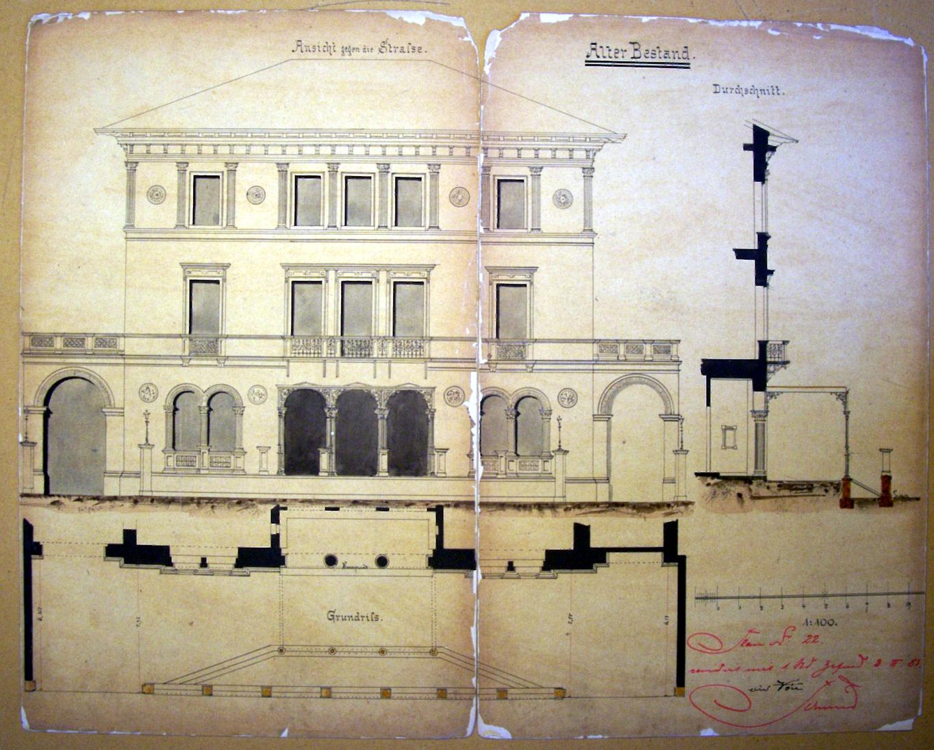 Palais Schönborn-Wiesentheid, München Ottostr. 9, Plan des Architekten Albert Schmidt, 3.2.1887, Maßstab 1 : 100